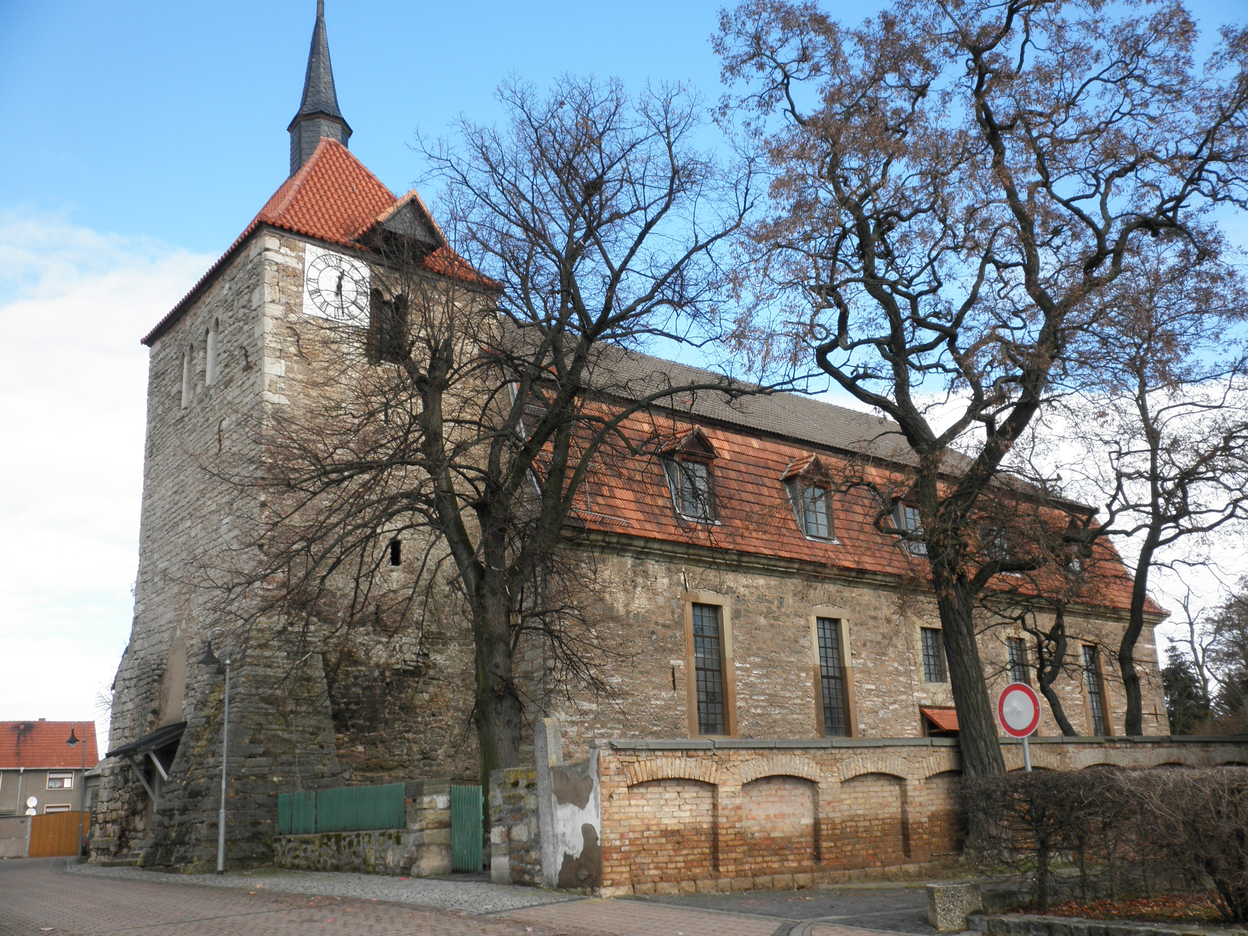 Dorfkirche